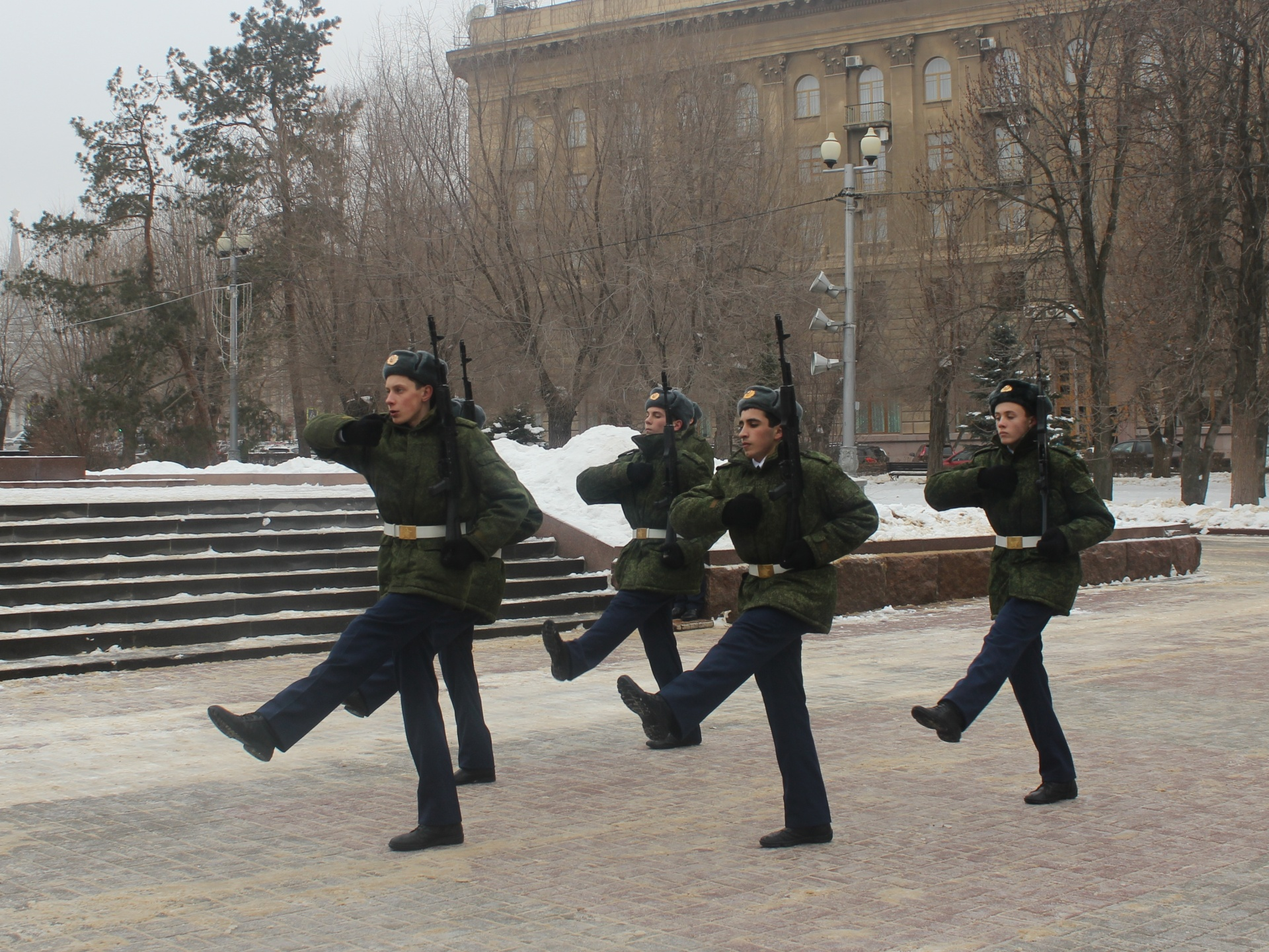 Воспитанники Волгоградского лицея имени Ф.Ф. Слипченко заступили на Пост №1